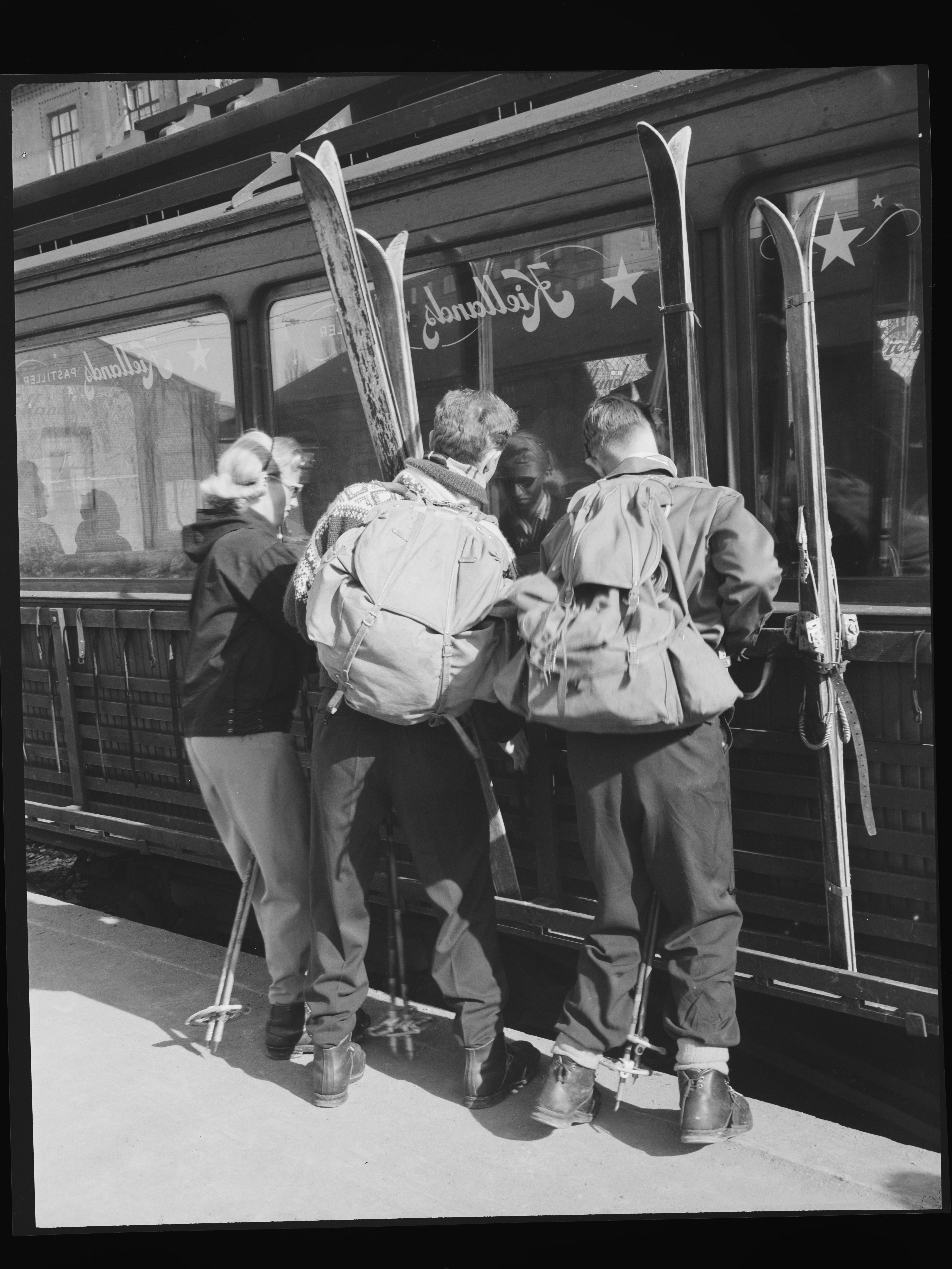 Bildet er hentet fra Nasjonalbibliotekets bildesamling Majorstuen,Oslo, Oslo, Oslo